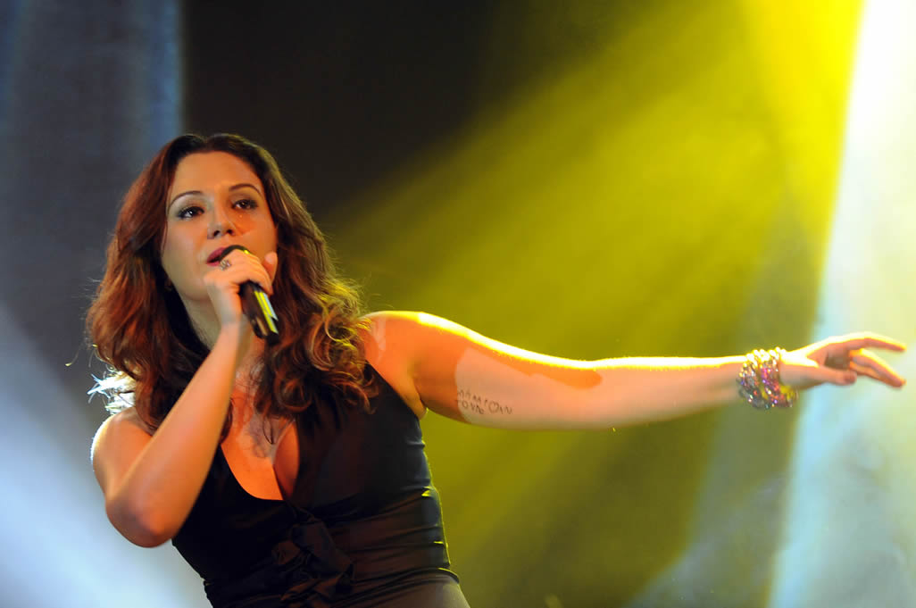 A cantora Maria Rita se apresentando após a cerimônia do Prêmio CNT de Jornalismo 2011.